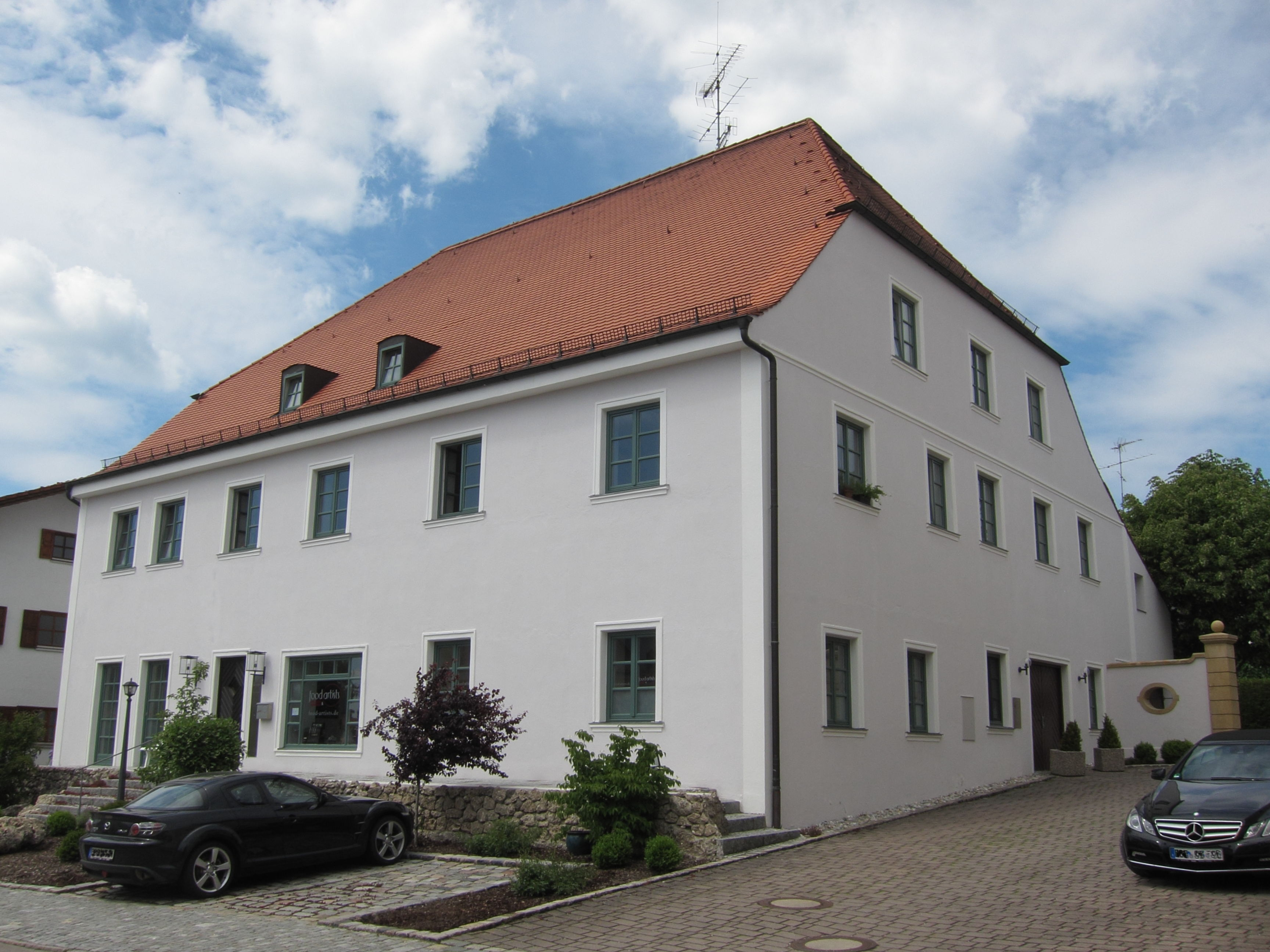 Anton-Grandauer-Str. 11; Wohnhaus, zweigeschossiger Putzbau mit Halbwalmdach, um 1800.